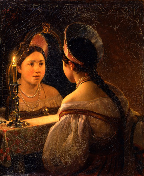 Svetlana at fortune-tellinglabel QS:Len,"Svetlana at fortune-telling" label QS:Lru,"Гадающая Светлана"" Единственное произведение К.П. Брюллова на национальную бытовую тему, созданное сразу же после возвращения художника из Италии. Роматнический сюжет полотна со сценой крещенского гадания навеян популярной в то время балладой В.А. Жуковского "Светлана". Однако картина имеет самостоятельный характер, ее можно считать своего рода живописной параллелью известному литературному произведению. Сохранность: удовлетворительная, Инв.номер: Ж-86